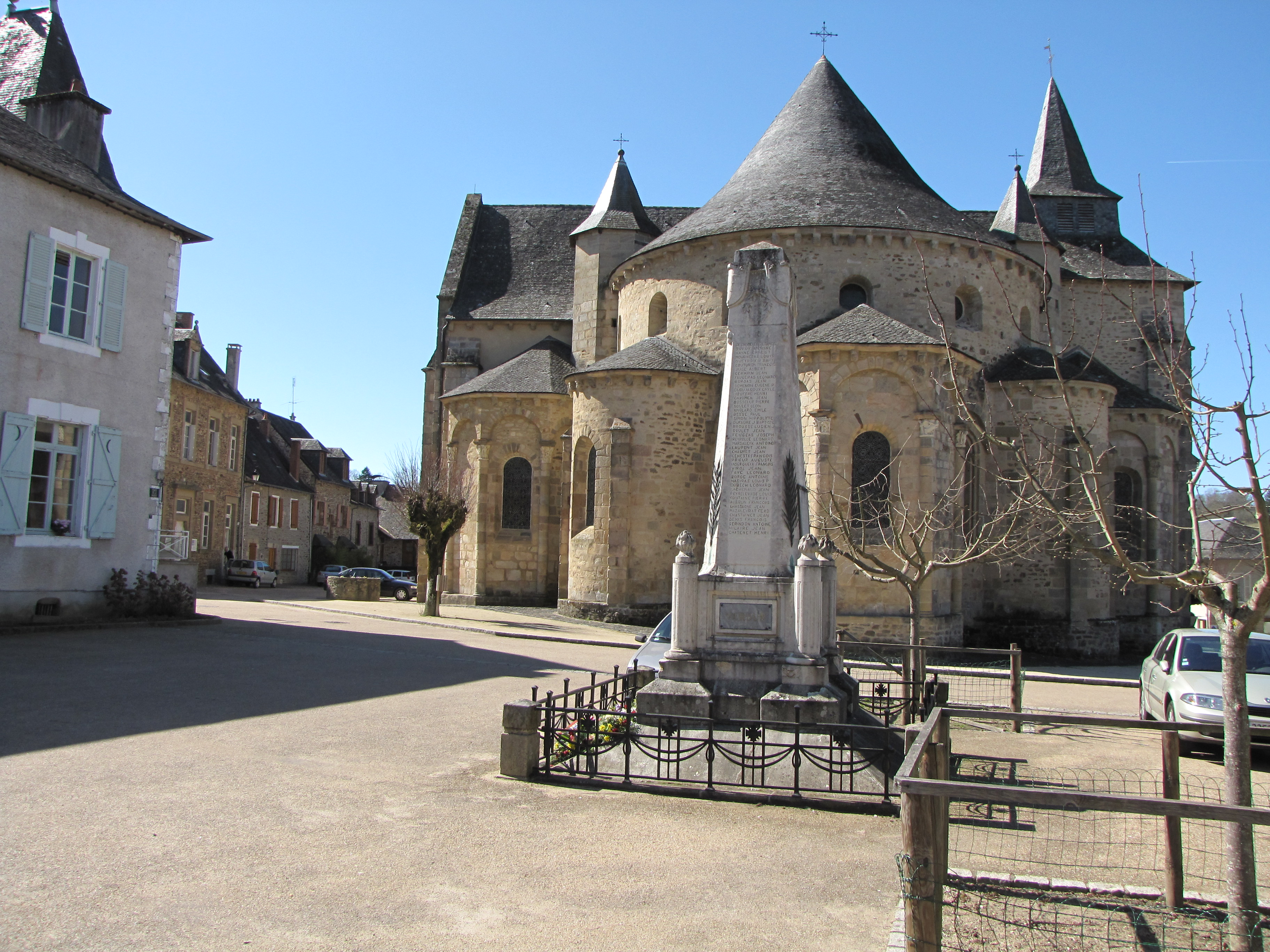 L'église abbatiale Saint-Pierre de Vigeois, Corrèze, France